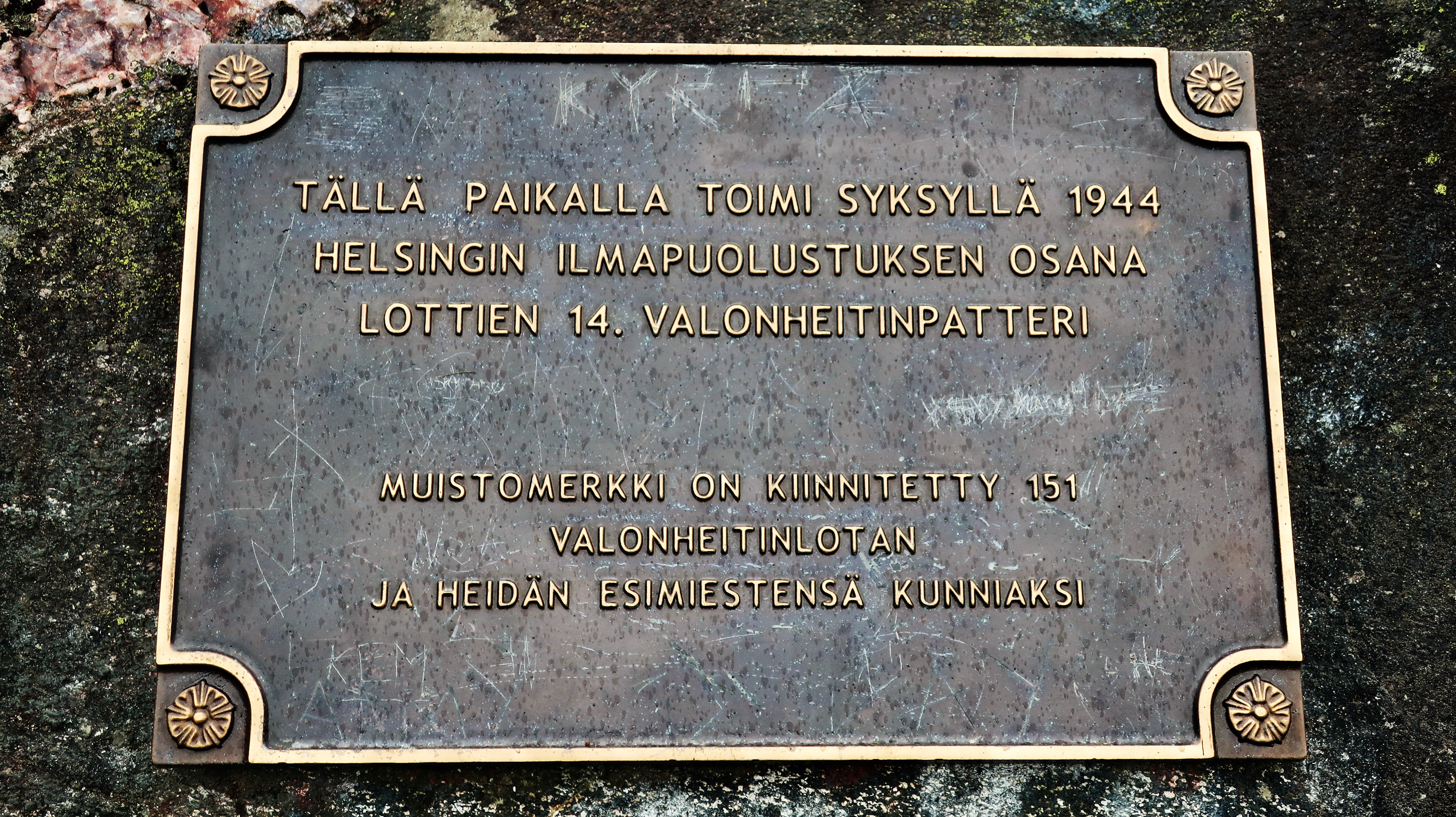 Muistolaatta Espoon Mäkkylässä, Mäkkylänmetsässä